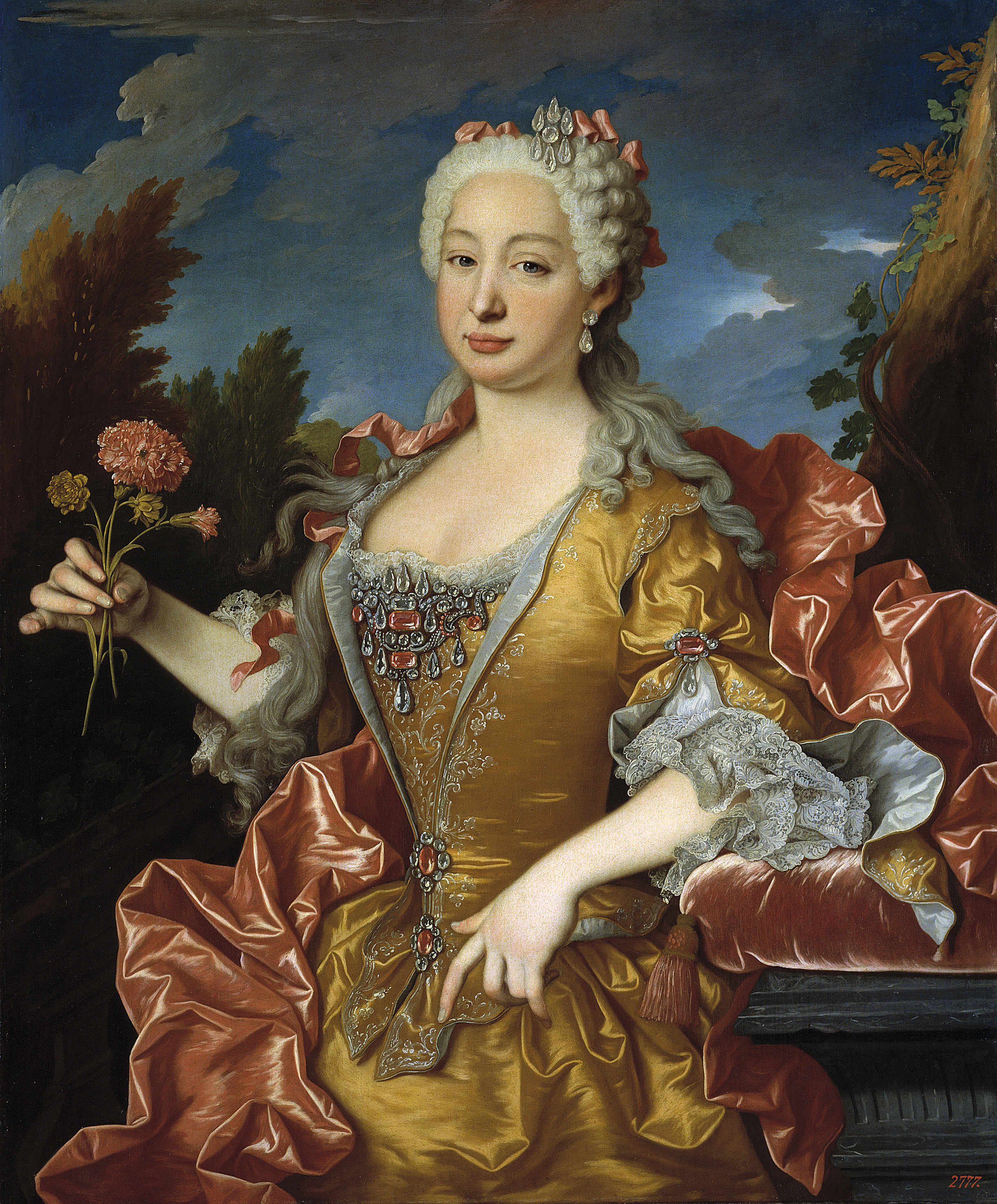 Retrato de la reina Bárbara de Braganza (1711-1758), que fue hija del rey Juan V de Portugal y de la reina María Ana de Austria.